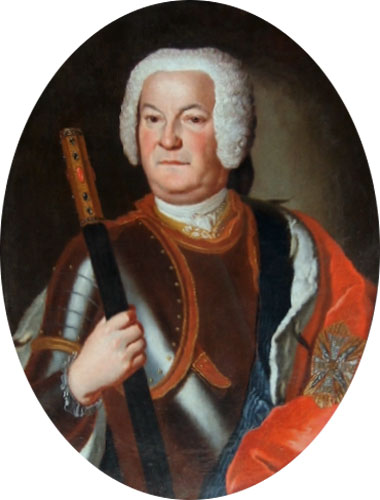 Беларуская (тарашкевіца): Партрэт Паўла Караля Сангушкі (Pavał Karal Sanguška)